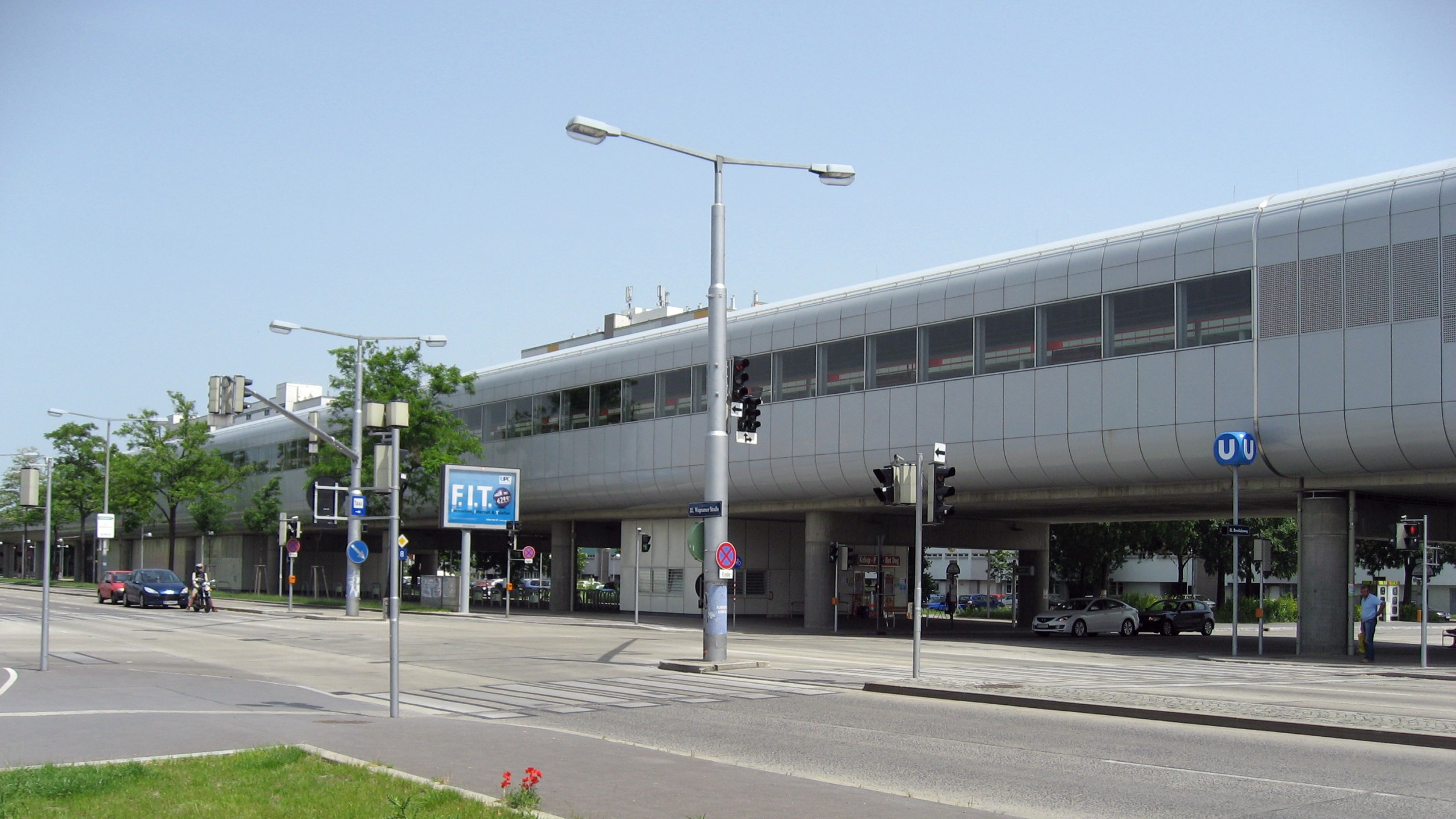 Wien U-Bahn-Station Rennbahnweg